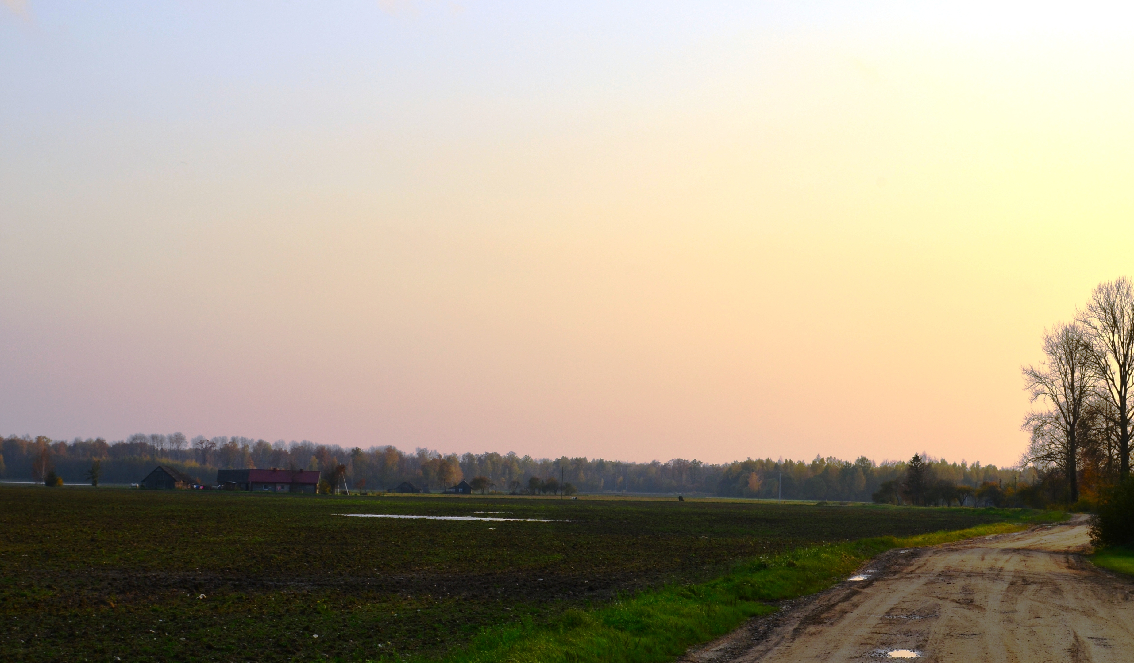 Gerdvilai, Kėdainių raj.